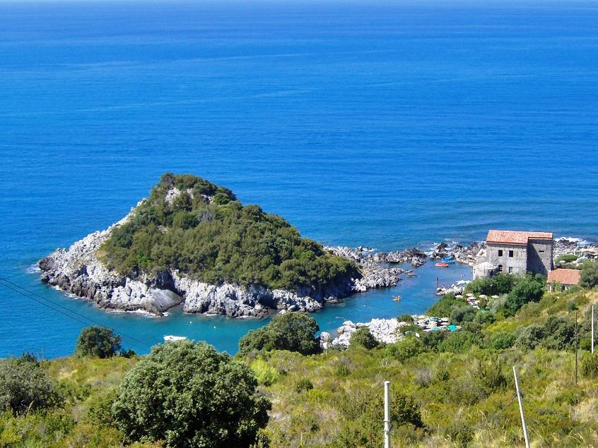 La Secca di Castrocucco e il Palazzo Baronale Labanchi.